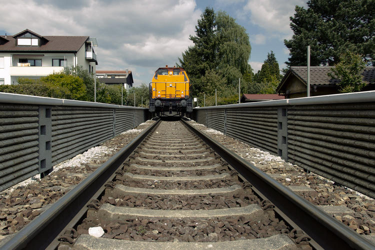 Niedrigschallschutzwände der Firma Betonwerk Rieder GmbH